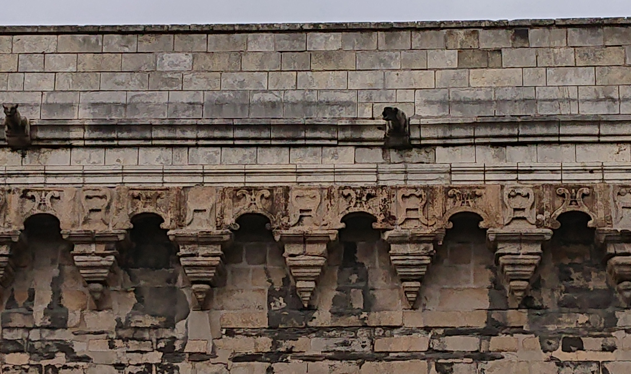 Courtine du Château des ducs de Bretagne, Nantes.